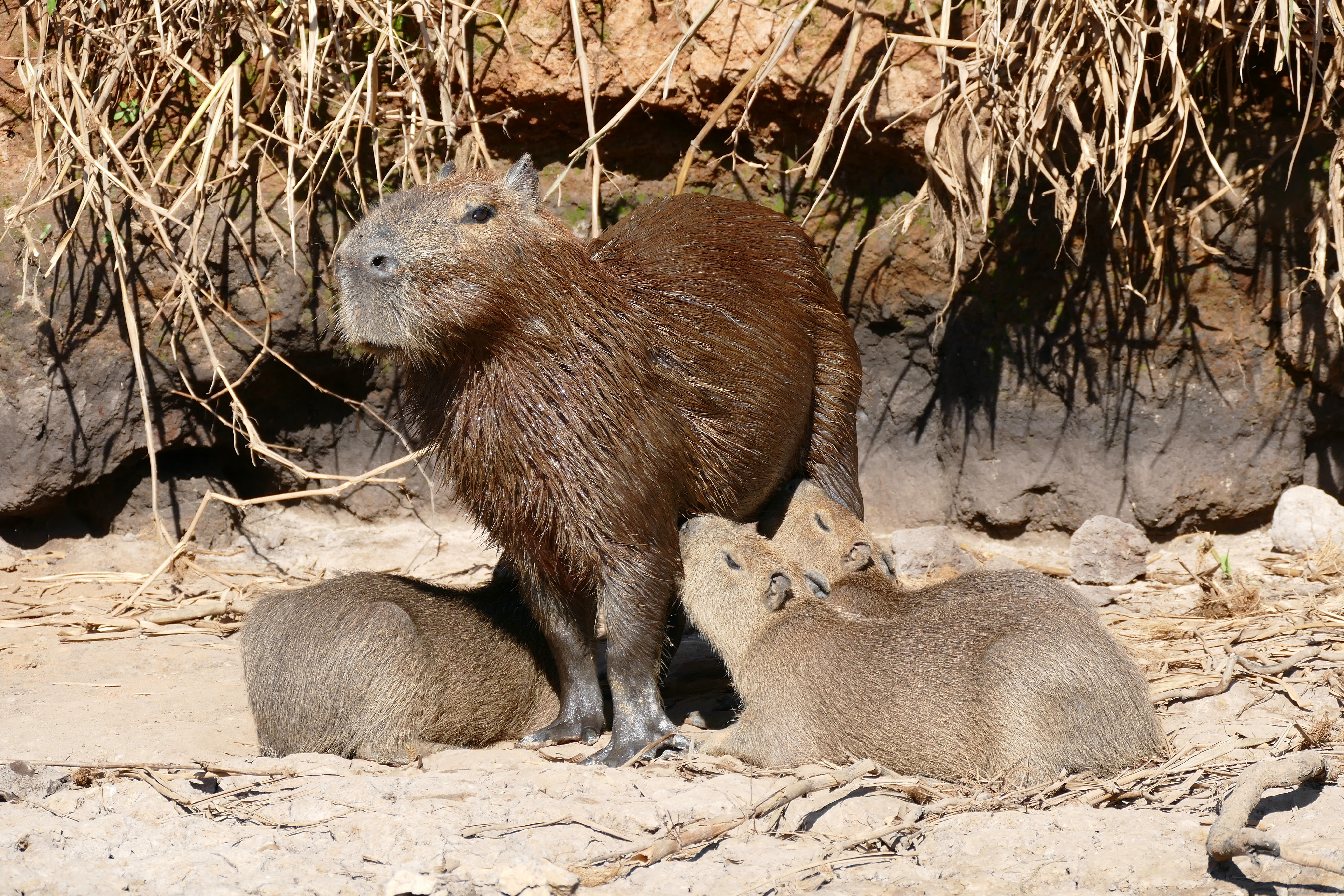 Rio São Lourenço, Porto Jofre area, Pantanal, Poconé, Mato Grosso, BRAZIL